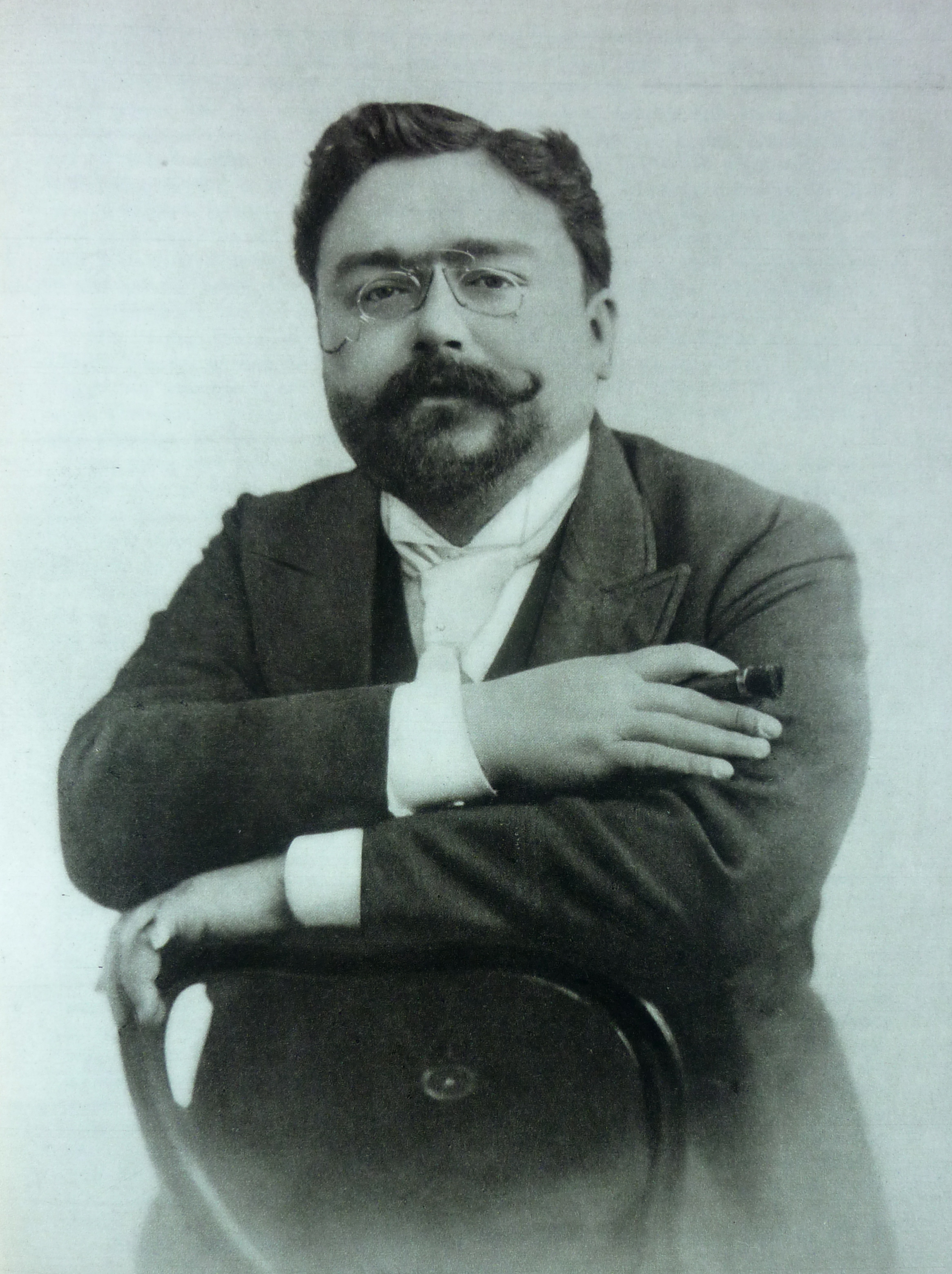 Isaac Albéniz, Photo Esplugas, Barcelona